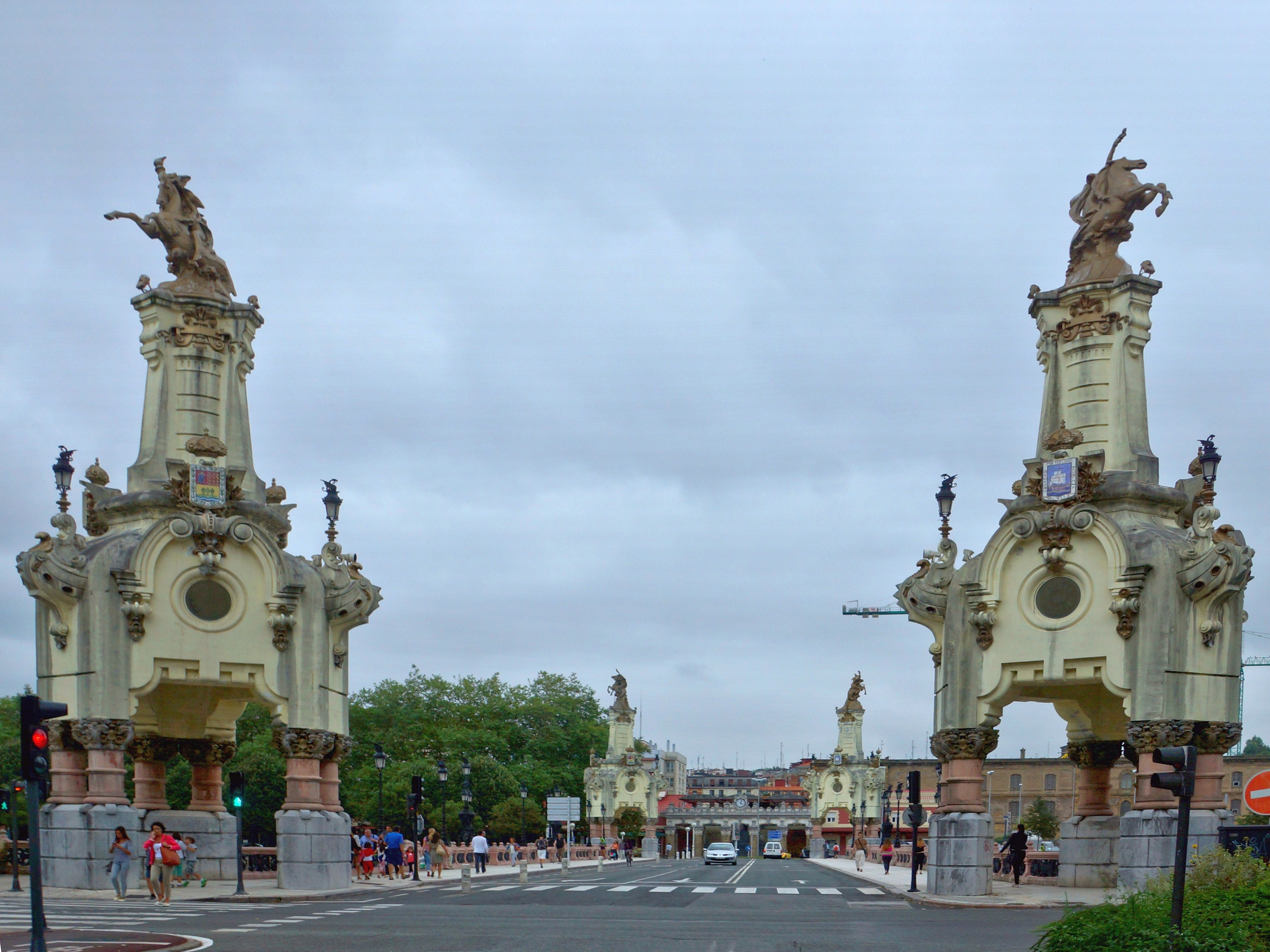 Die Brücke "Puente de María Cristina" in Donostia San Sebastian über den Fluss Urumea. Stahlbetonbrücke mit Kunstbauwerken an den Brückenköpfen: vier eigenwillige Pylone mit Reiterstandbildern. Foto Wolfgang Pehlemann DSC00212